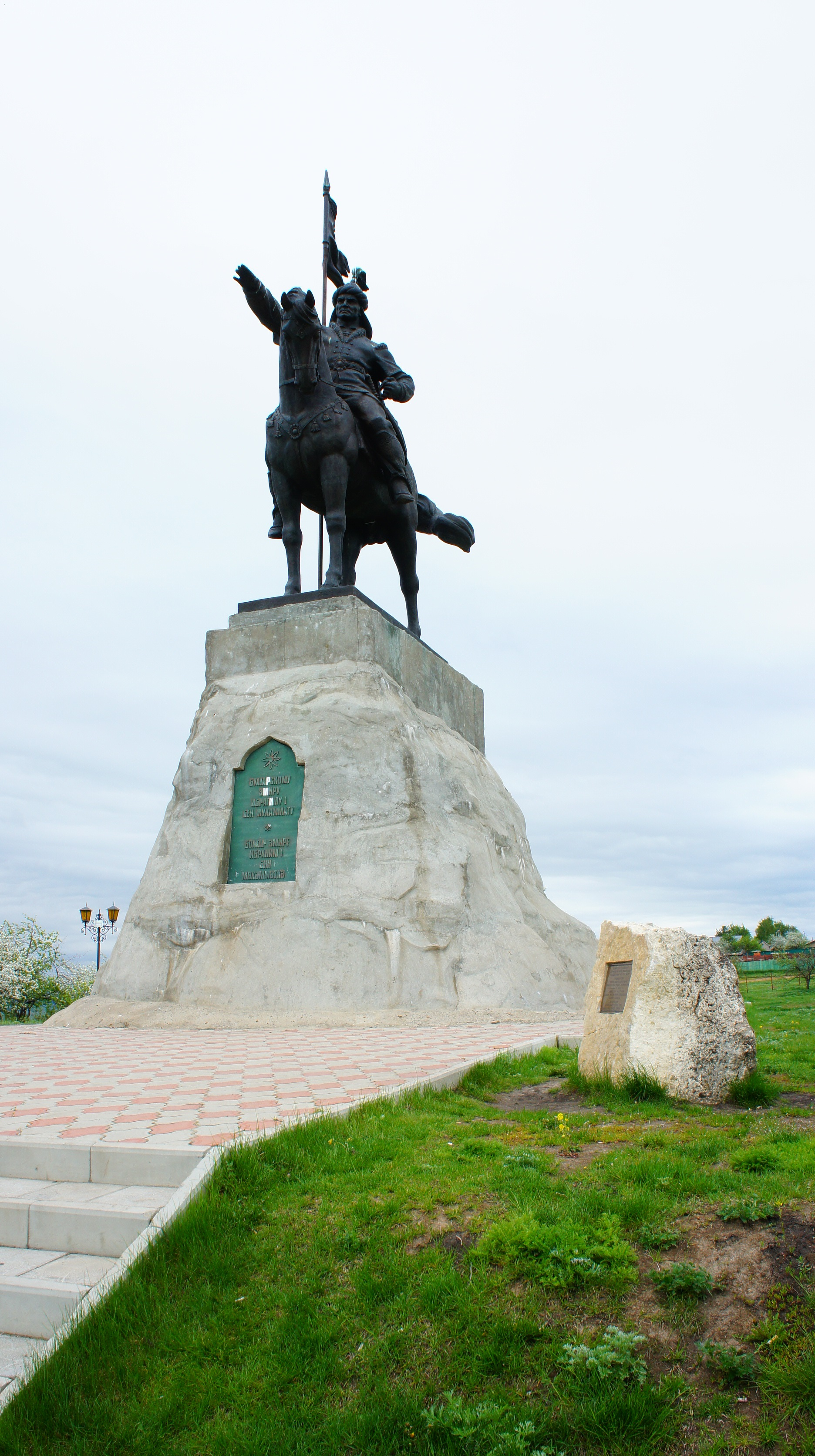 Конный памятник эмиру Ибрагиму I бен Мухаммад (Чертово Городище: Елабужский район, Татарстан) This image is related to the protected area of Russia number 1610078